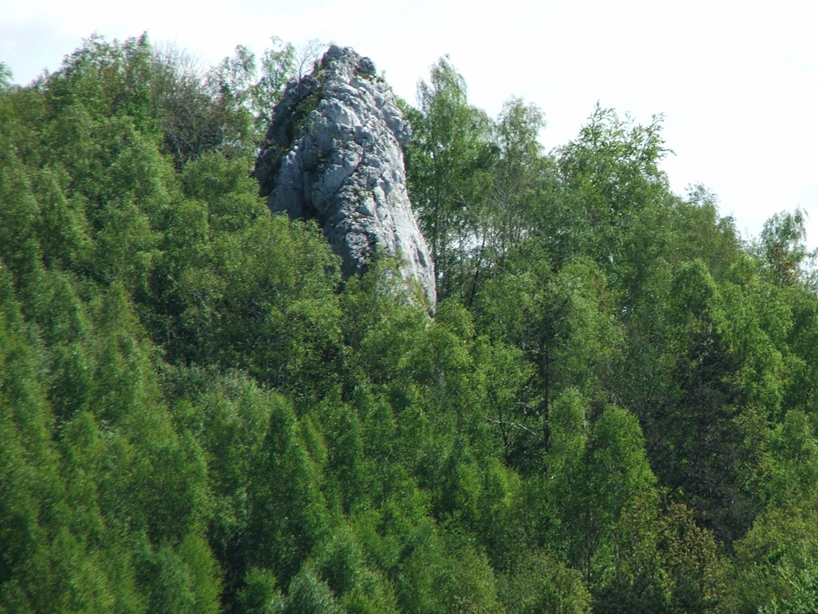 Łyse Baszty w Dolinie Szklarki (Dolinki Krakowskie)